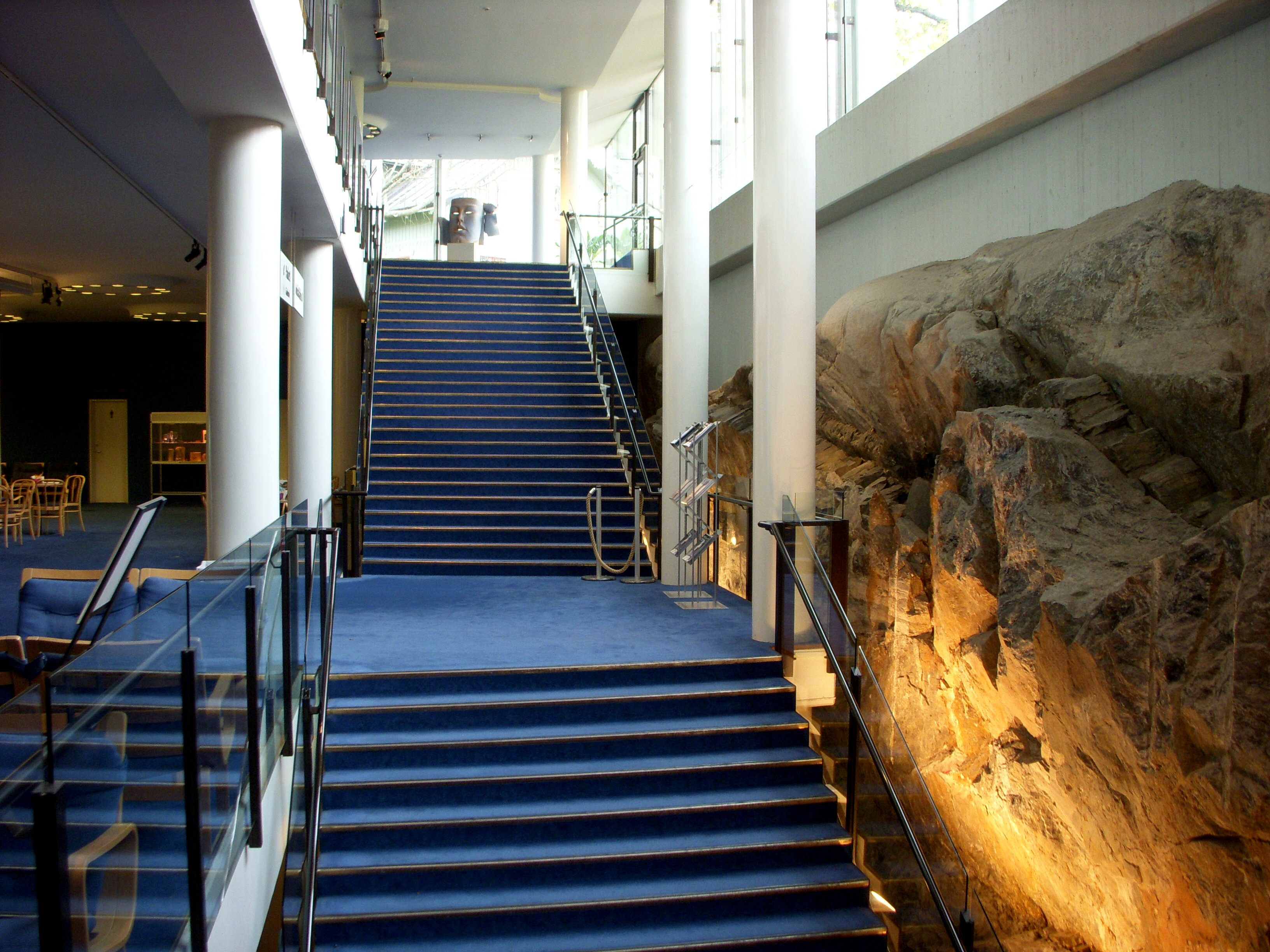 Interiör av Berwaldhallen i Stockholm